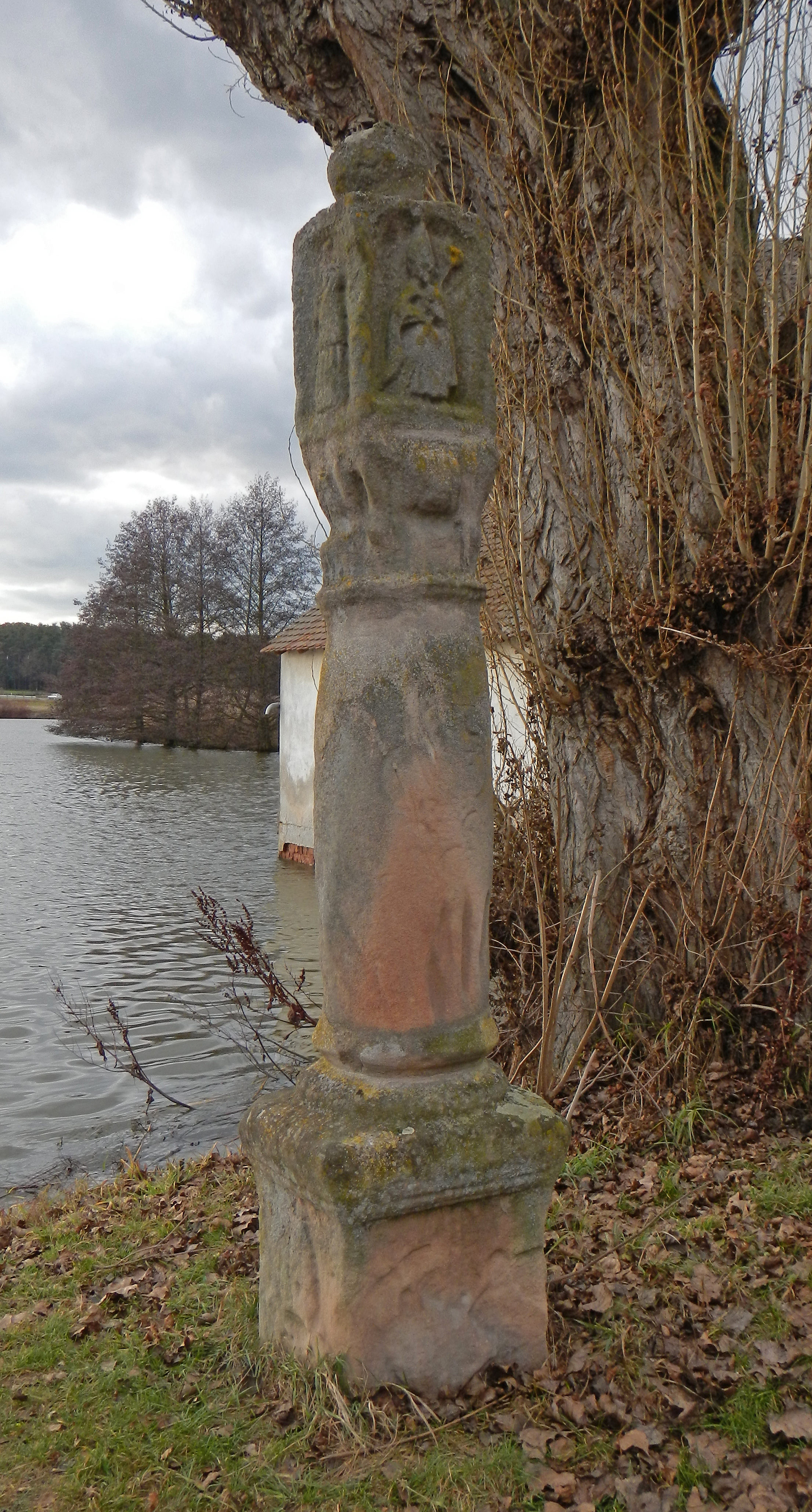 Bildstock, Sandstein, bez. 1799 in Untermembach (Gemeinde Heßdorf) im Landkreis Erlangen-Höchstadt.